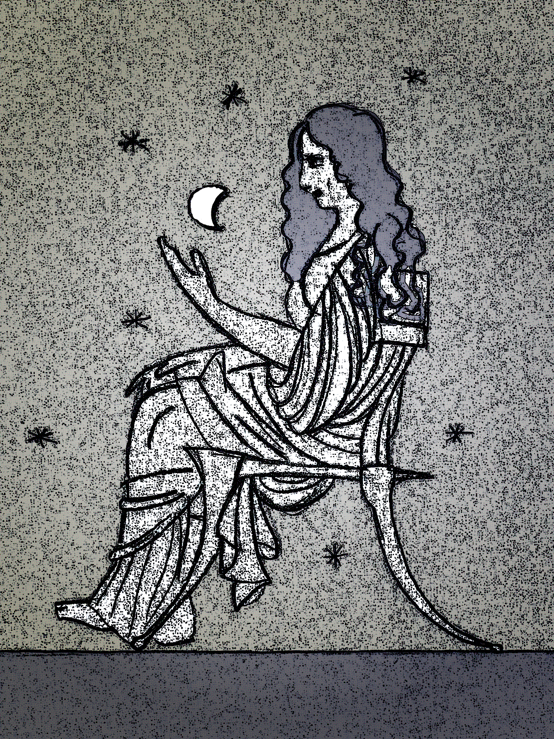 Aglaonice